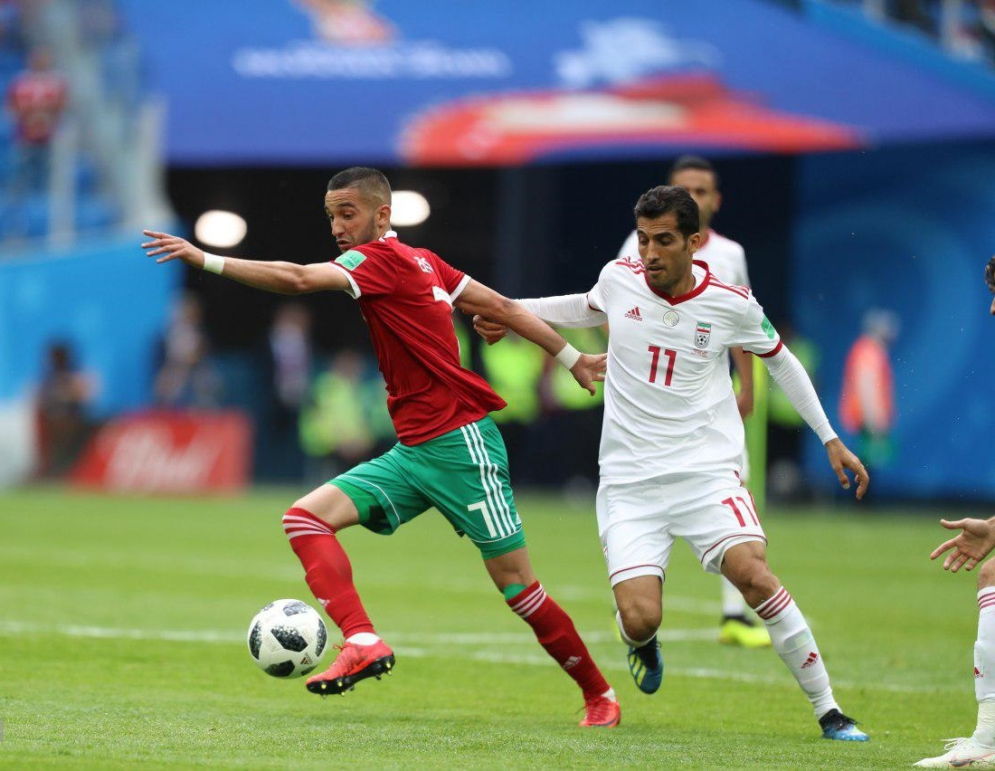 بازی تیم فوتبال ایران و مراکش در جام جهانی ۲۰۱۸